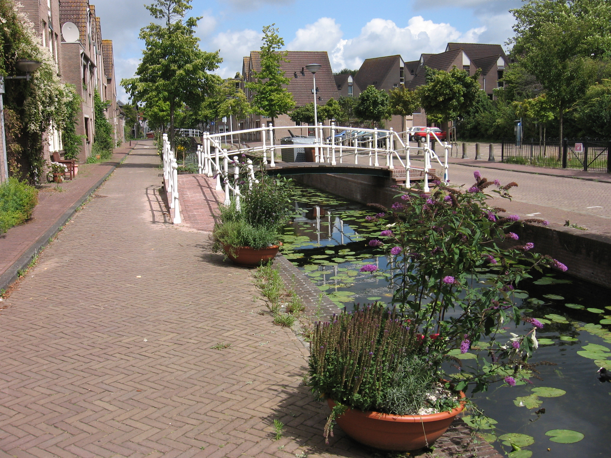 Poppebrug Leiden.jpg